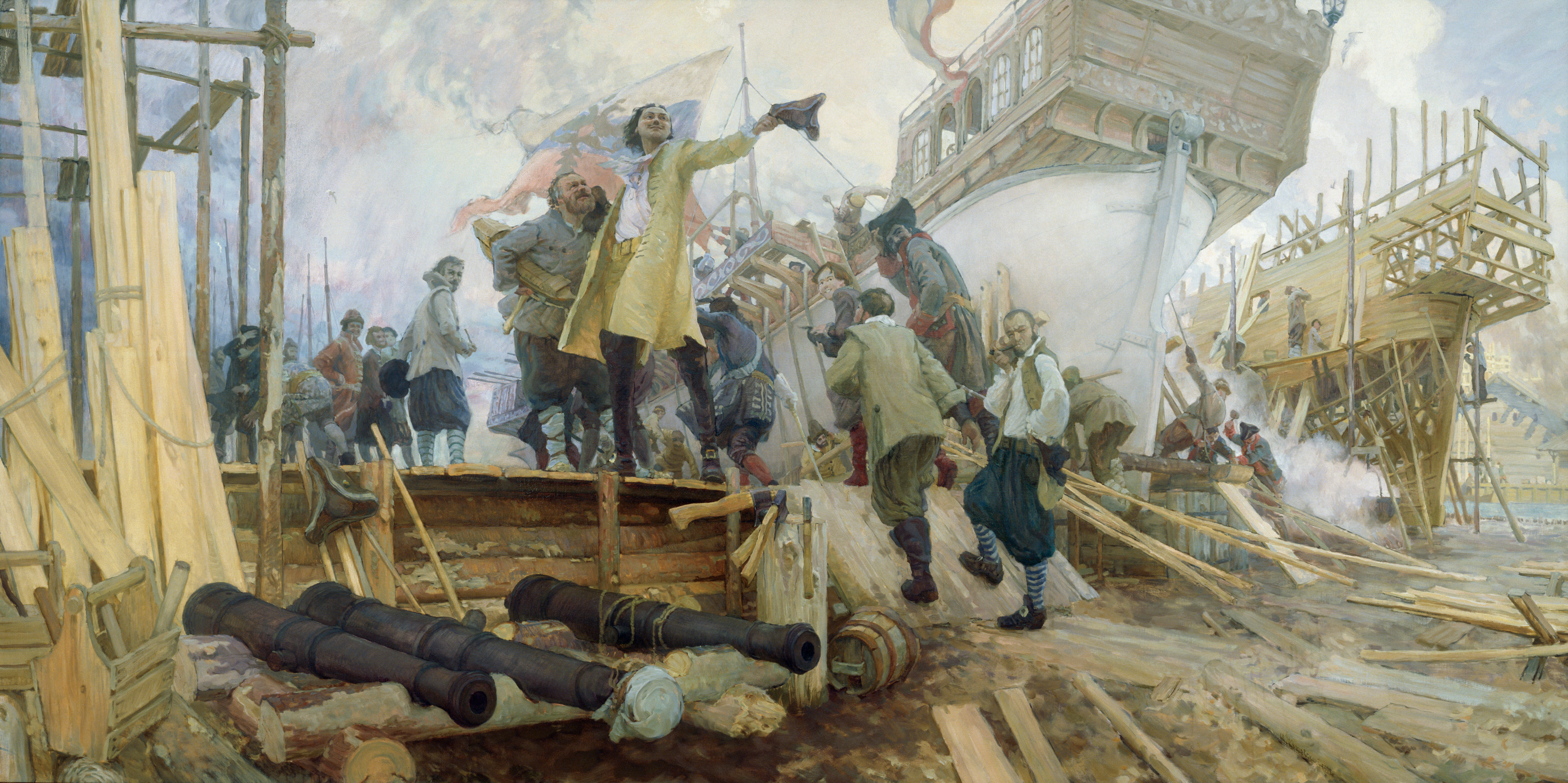 Юрий Кушевский. «Постройка в Воронеже флотилии для второго Азовского похода Петром I в 1696 г». Холст,масло. 130х260. 2009 год.subst:OP